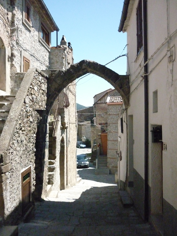 San Giovanni in Fiore - Arco Normanno